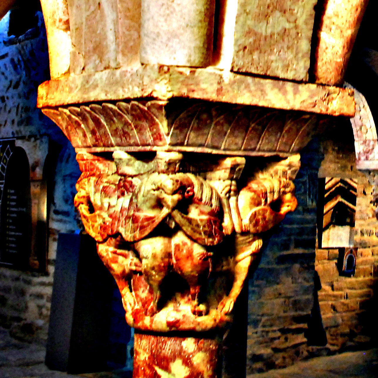 Serrabone, Empore, Kapitell Nr 10